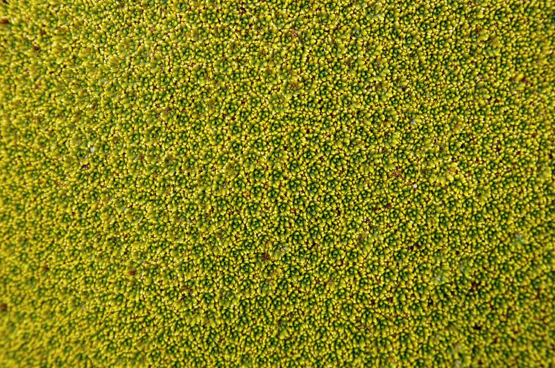 Yareta plant, Bolivia, 07/2007